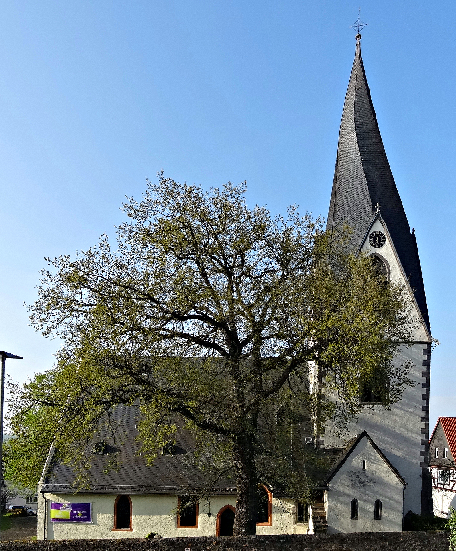 Evangelische Pfarrkirche Münzenberg